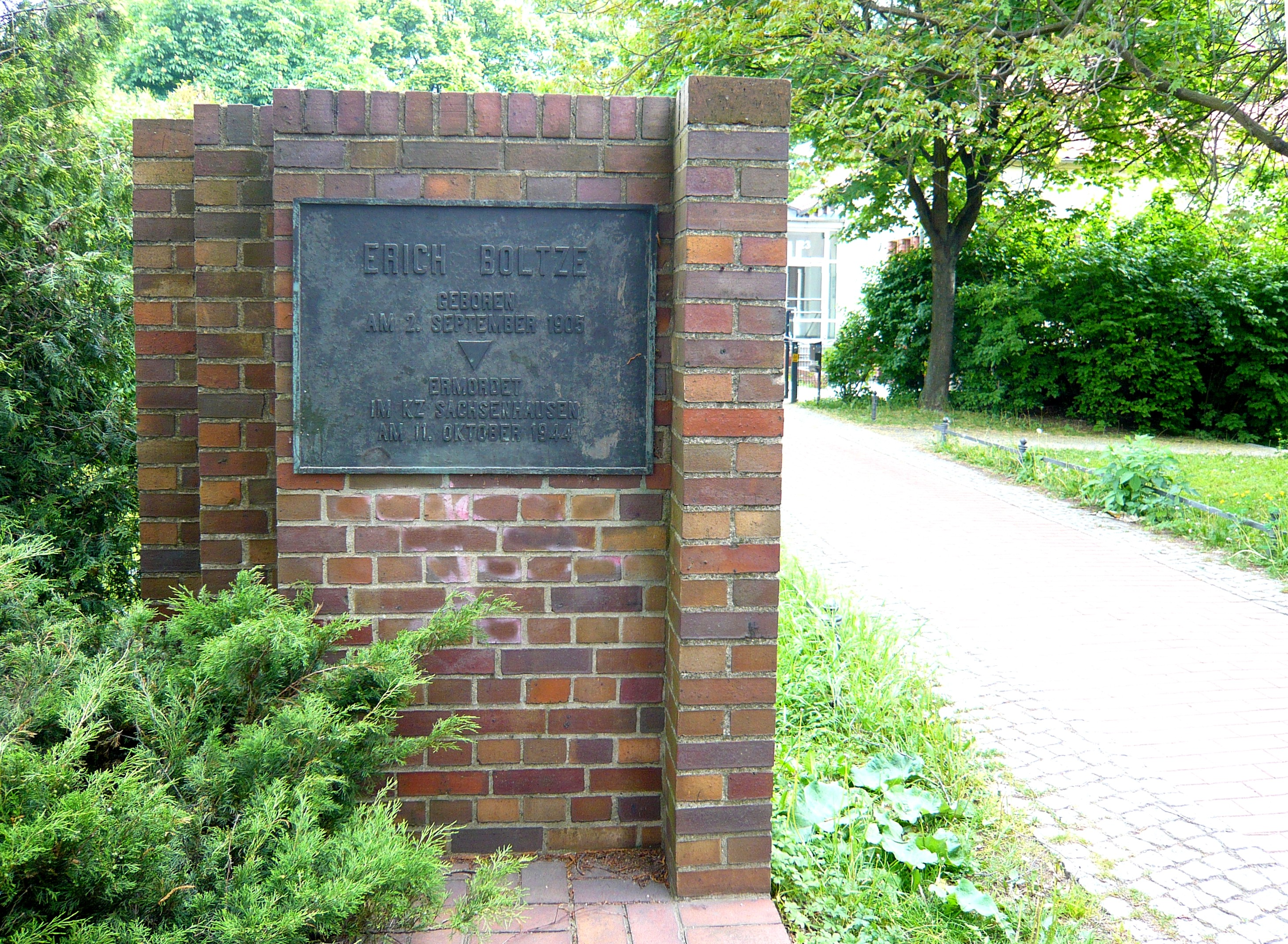 Weißensee